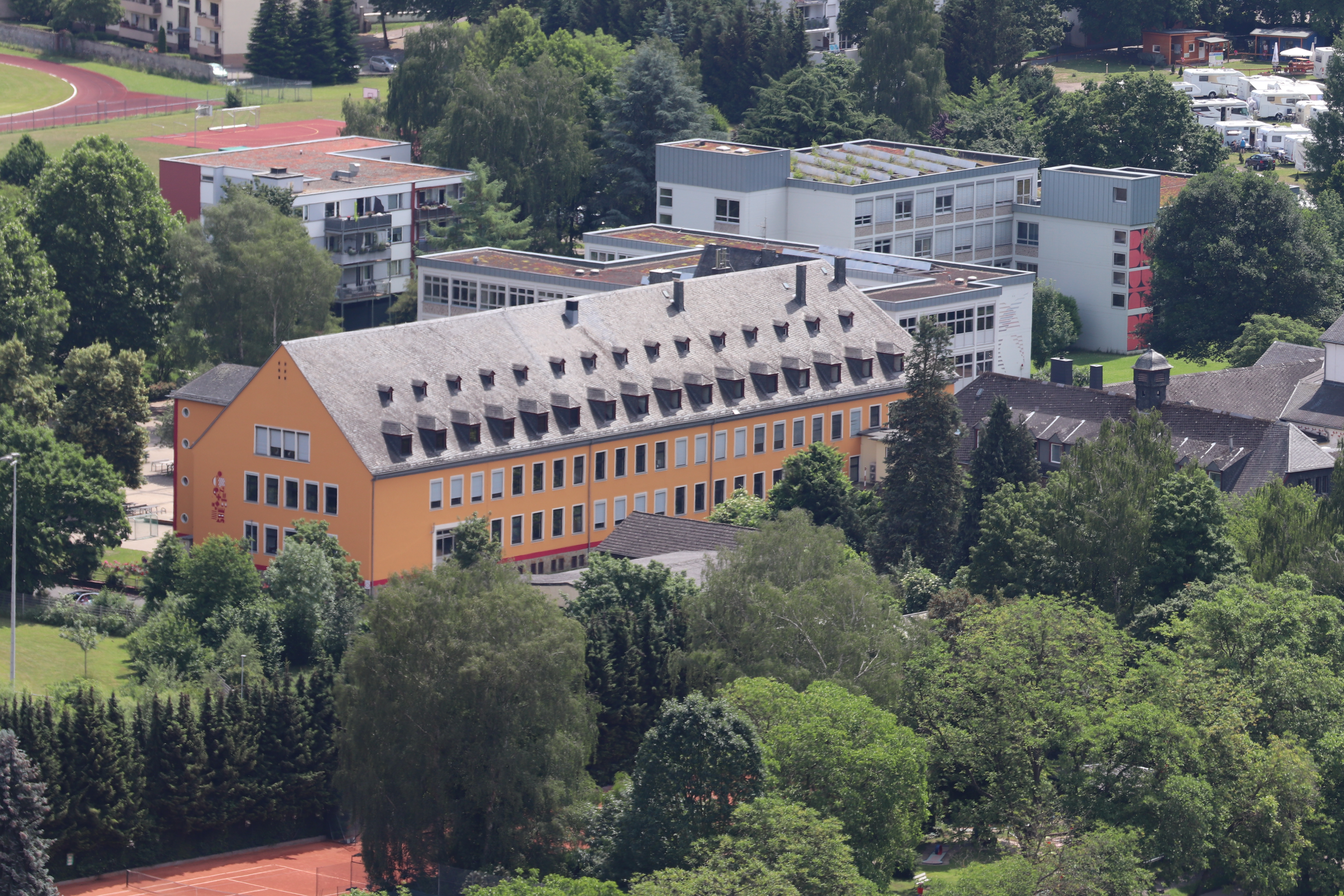 Blick von einem Aussichtspunkt auf dem linksrheinischen Rheinburgenweg auf Lahnstein. Hier das Johannes-Gymnasium Lahnstein.